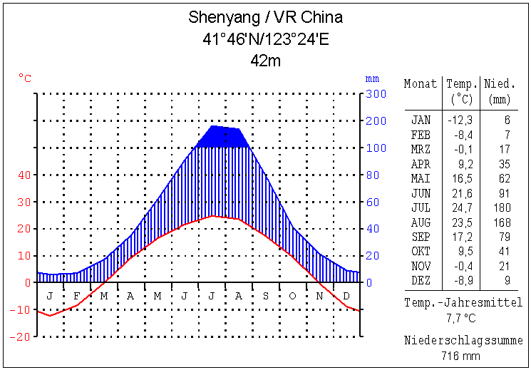 Hinter Hph verbirgt sich Hans-Peter, Jahrgang 1946, Lehrer für Erdkunde, Geschichte und Politik an einem niedersächsischen Gymnasium. Vor allem interessiert an Asien allgemein und China speziell. 745 x 519 (13692 Byte) (Klimadiagramm Shenyang (selbst erstellt)